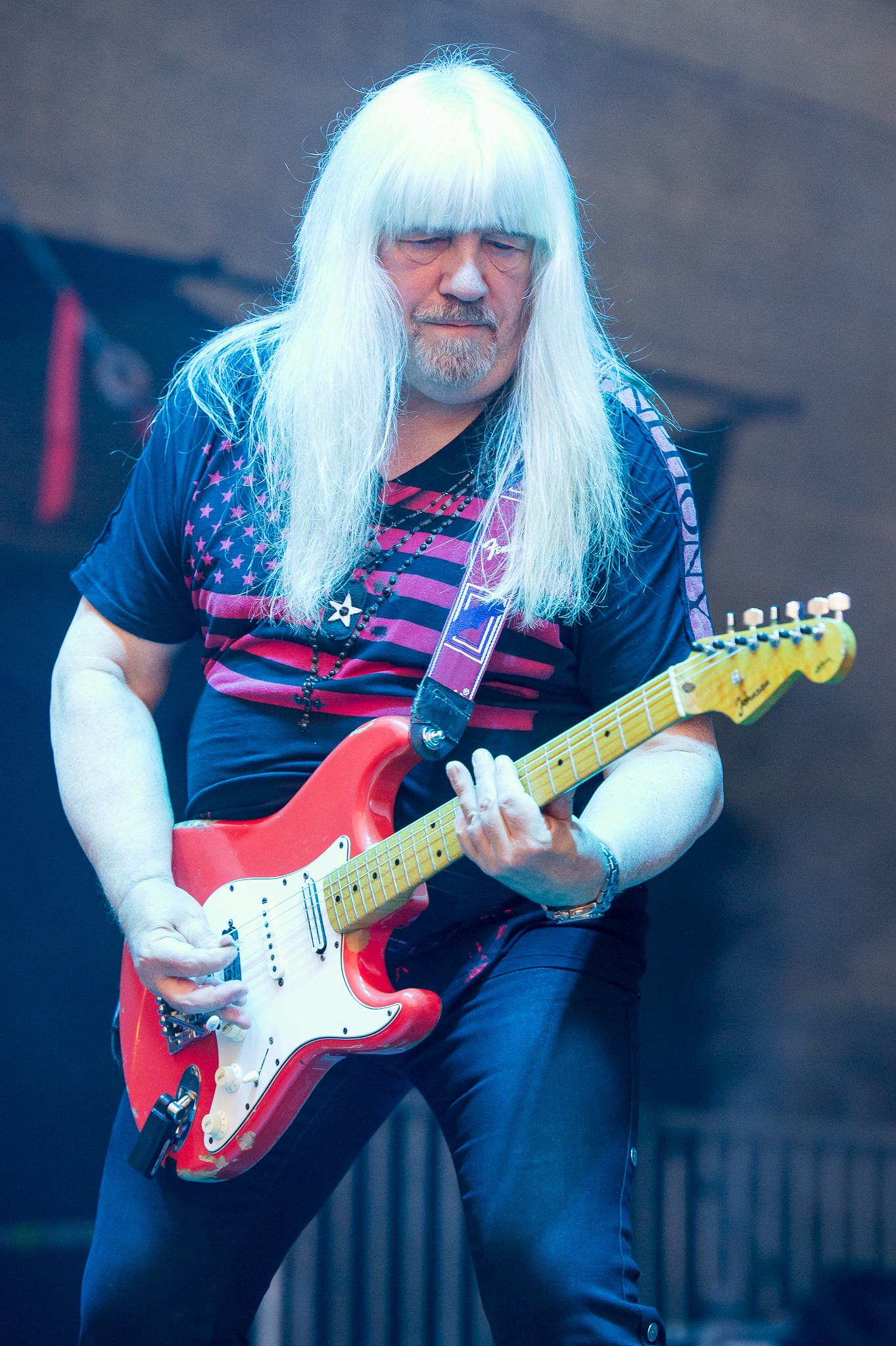 Andy Scott,Concertbüro Franken,Festival,Konzert,Lieder am See,Livekonzert,Livemusik,Musik,The Sweet